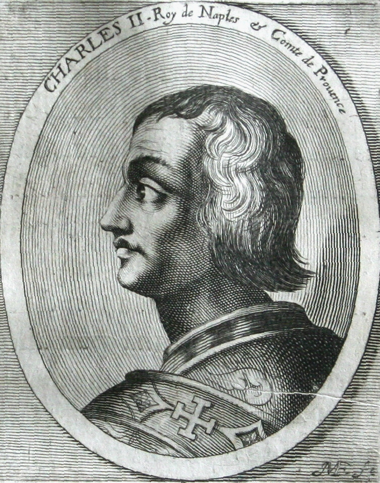 Comte Charles II de Provence, gravure de l'histoire des Comtes de Provence par Antoine de Ruffi, 1655.